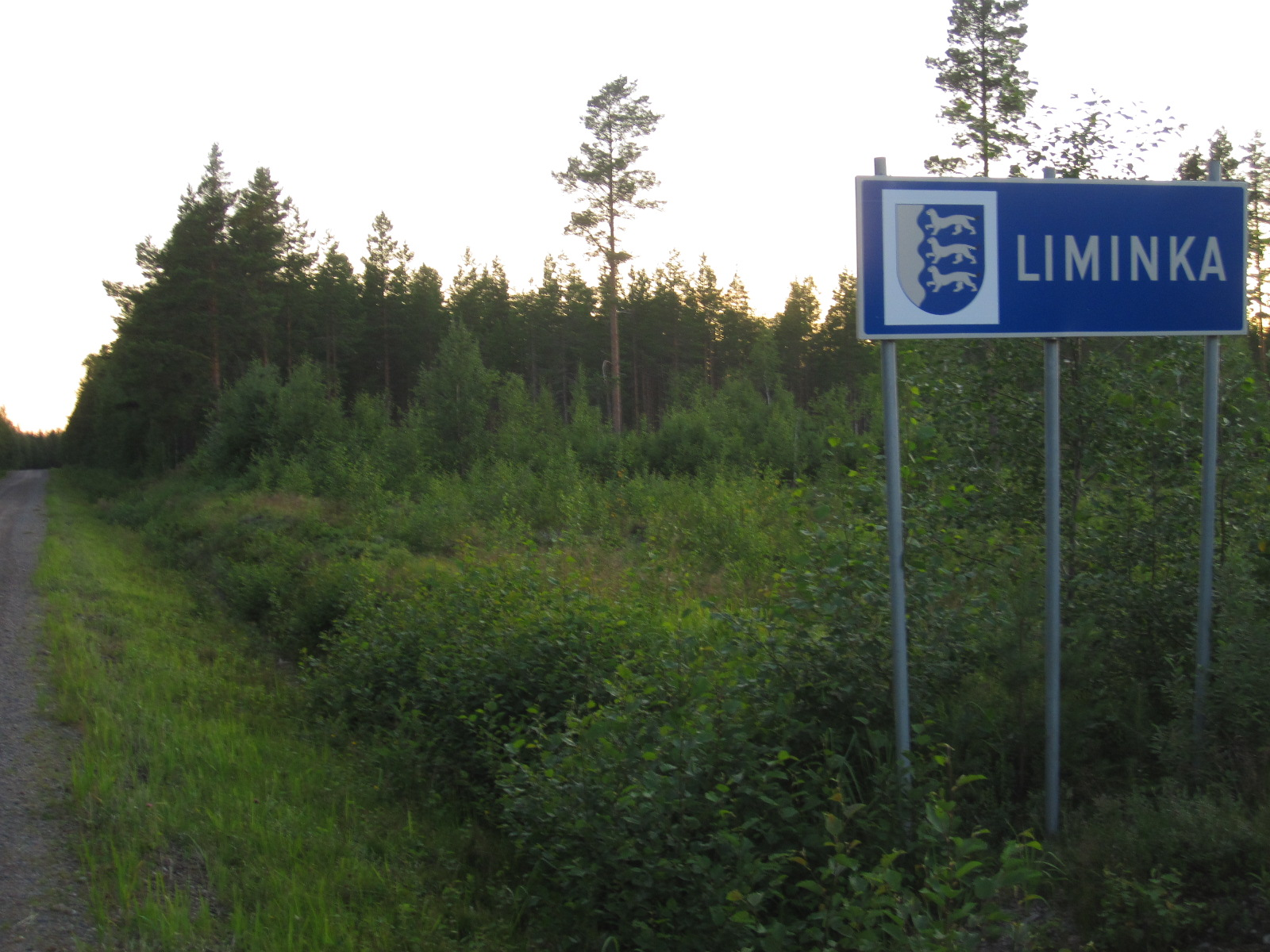 Limingan kunnanrajakyltti yhdystiellä 8240 (Kylmäläntie) Muhoksen Kylmälänkylältä Tyrnävän kirkonkylälle johtavalla tieosuudella (Muhoksen suunnalta)